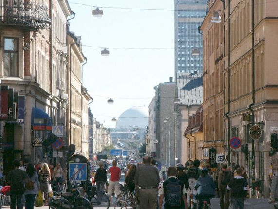 Götgatan, Stockholm, Sweden.